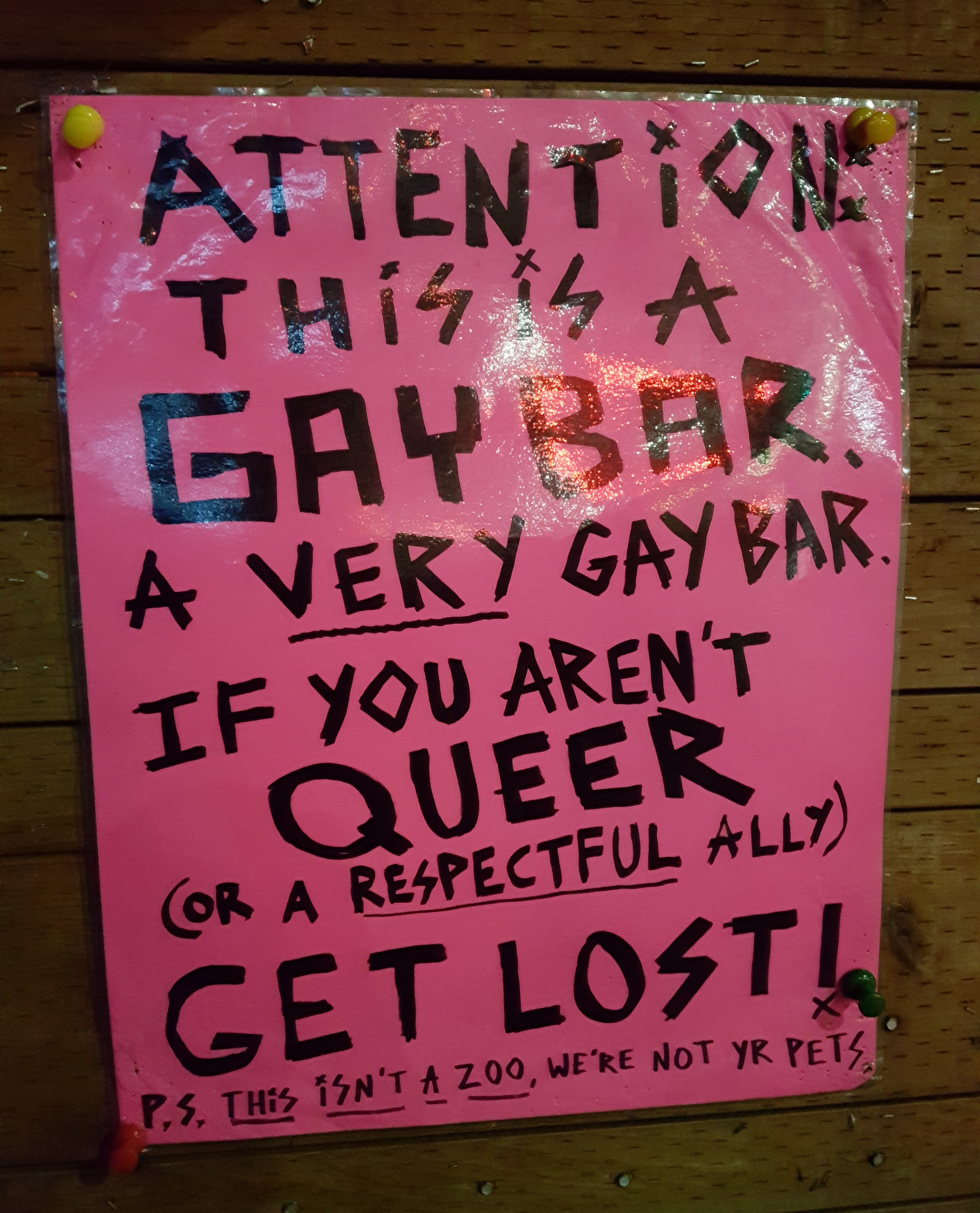 Pony